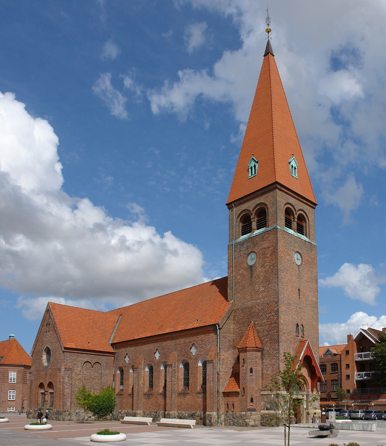 Kirche von Holstebro, erbaut 1909. Die mittelalterliche Vorgängerkirche wurde 1906 abgerissen.